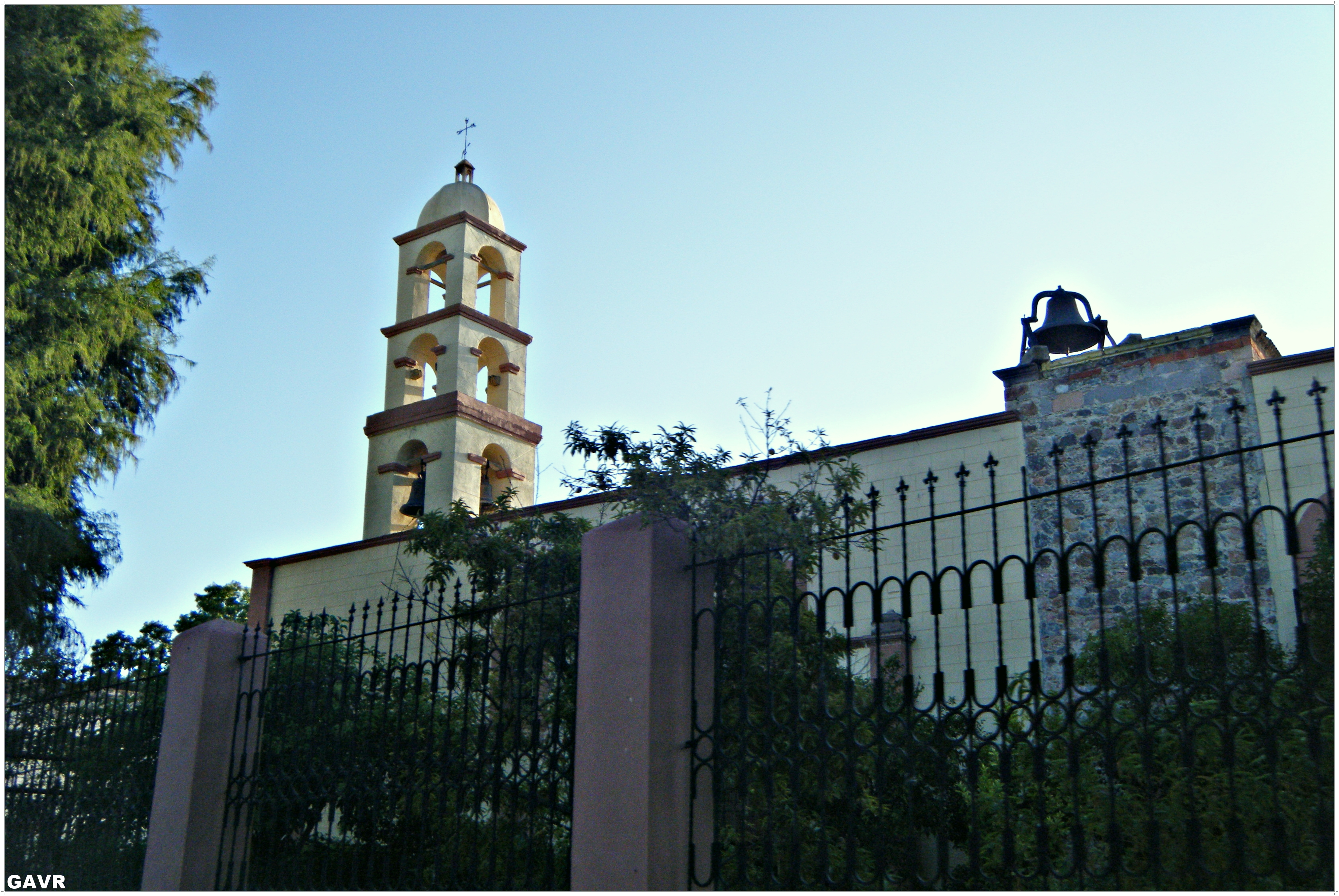 peñon blanco